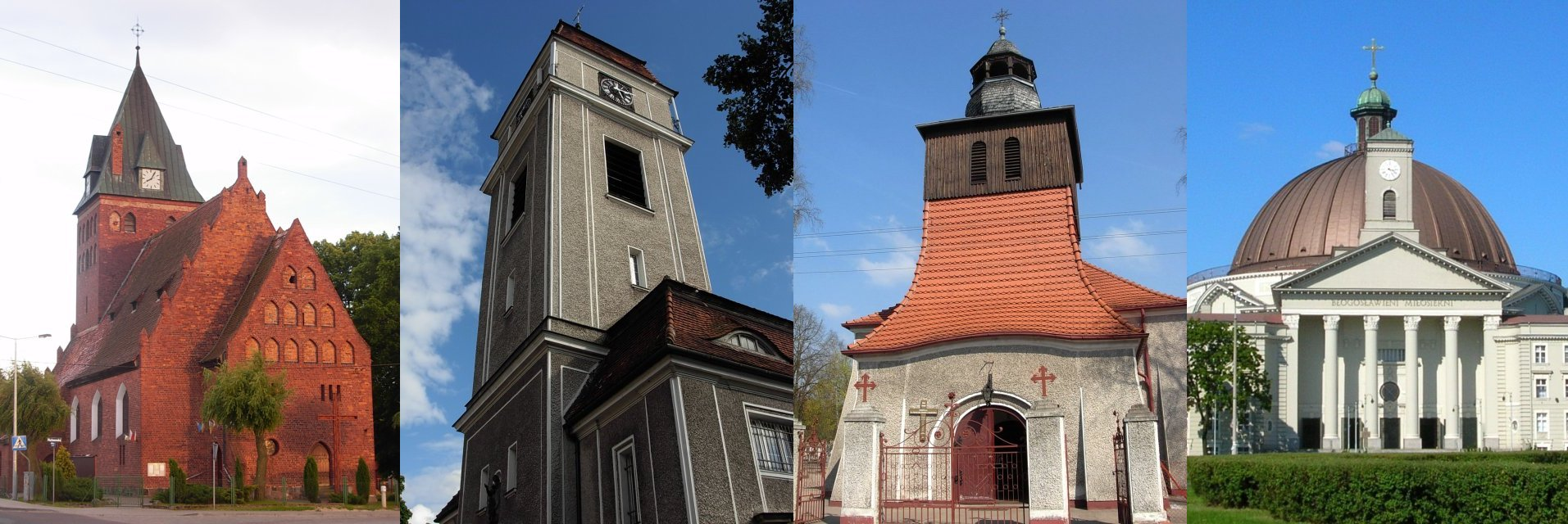 Kościoły bydgoskie - panorama